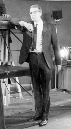 In Zusammenarbeit mit Studierenden der Pädagogischen Hochschule und dem Institut für Film und Bild in Wissenschaft und Unterricht aus München wird ein Unterrichtsfilm produziert. Im Bild, v.r.n.l.: Produzent Hans-W. Busse, Rektor der Pädagogischen Hochschule (PH) und Verfasser der 2. Regiefassung Prof. Ivo Braak, Auftraggeber Günter Fischer, Autor und Regisseur Reimer Bull.